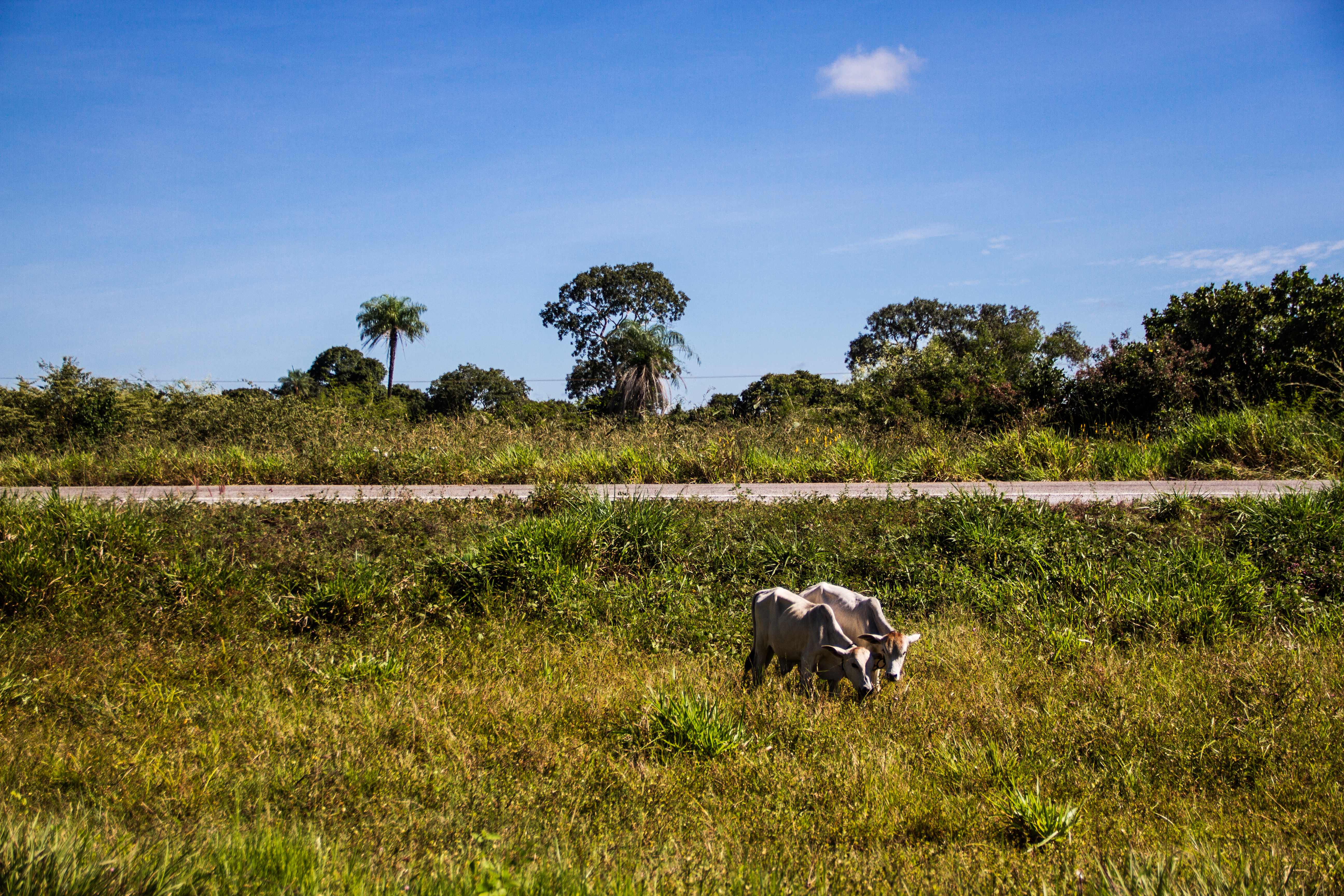 Descrição_para_sua_foto